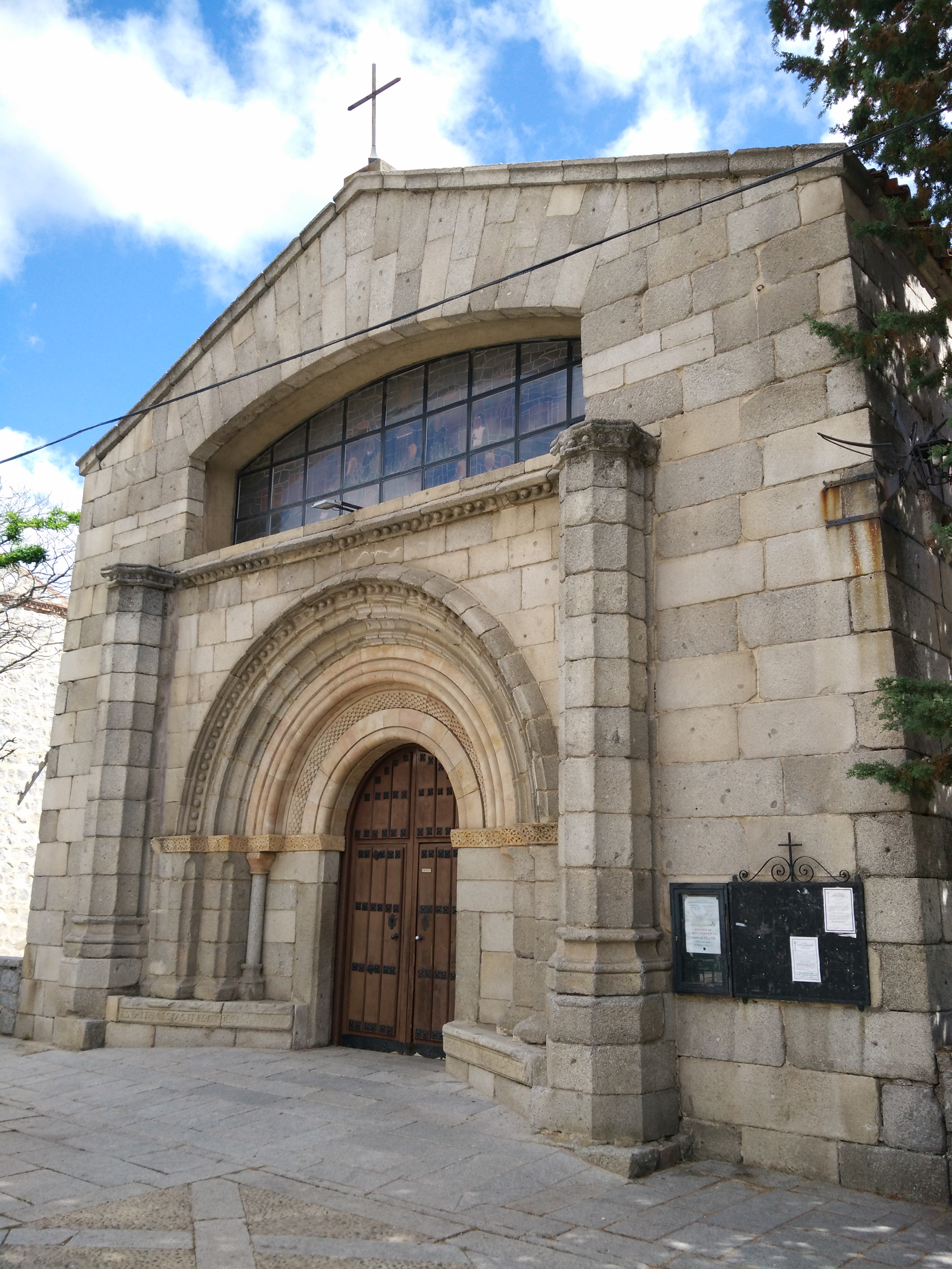 Iglesia del Inmaculado Corazón de María - ICM (Ávila) con portada procedente de la desaparecida Iglesia románica de Santo Domingo de Silos que existió en Ávila hasta 1947